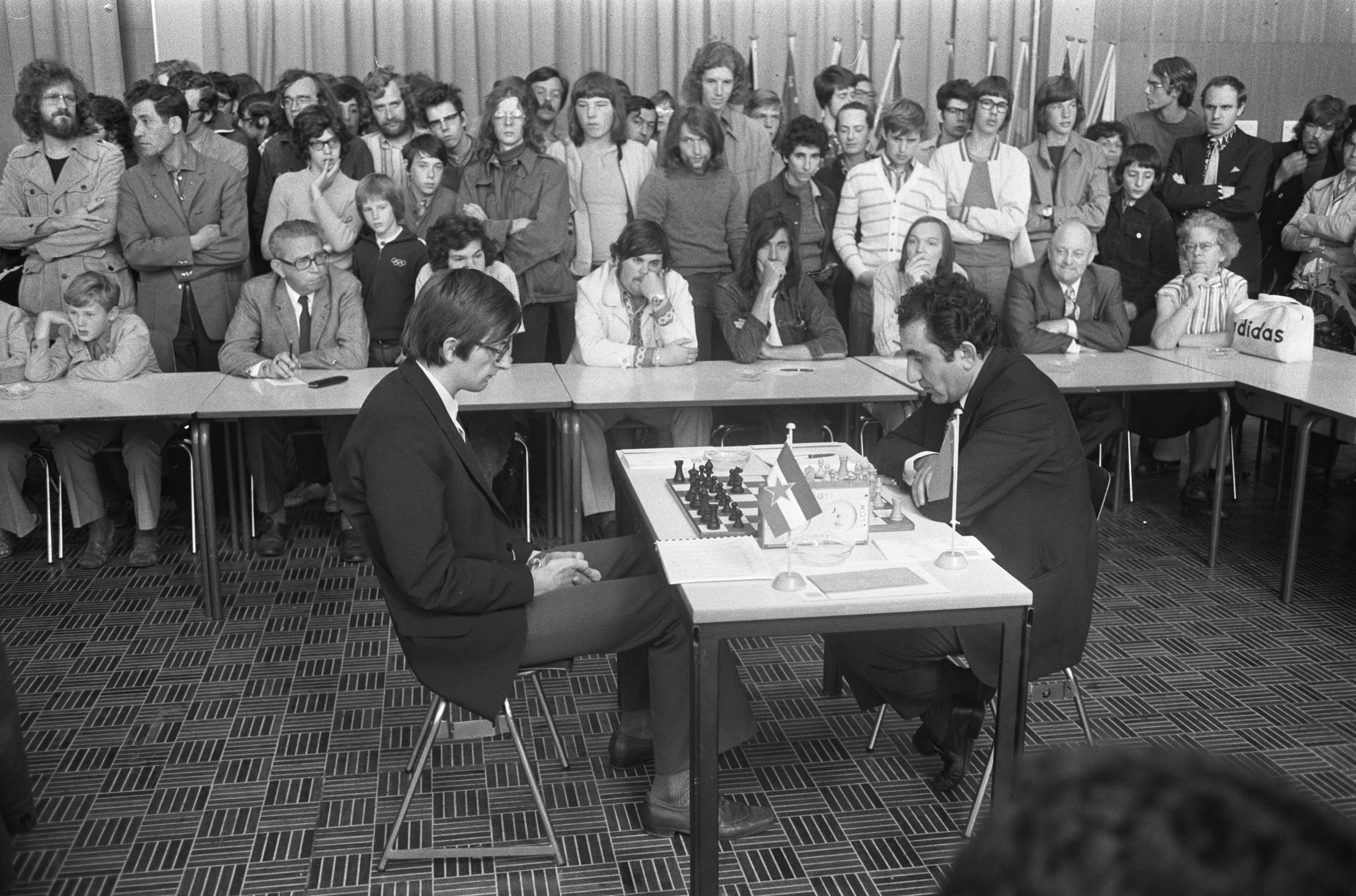 Collectie / Archief : Fotocollectie Anefo Reportage / Serie : [ onbekend ] Beschrijving : IBM-schaaktoernooi, Planinec (links) en Petrosjan Datum : 30 juli 1973 Locatie : Amsterdam Trefwoorden : schaken Persoonsnaam : Petrosian, Tigran, Planinec, Albin Instellingsnaam : IBM-Schaaktoernooi Fotograaf : Croes, Rob C. / Anefo Auteursrechthebbende : Nationaal Archief Materiaalsoort : Negatief (zwart/wit) Nummer archiefinventaris : bekijk toegang 2.24.01.05 Bestanddeelnummer : 926-5794